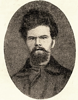 Makar Vasil'evič Tetërka